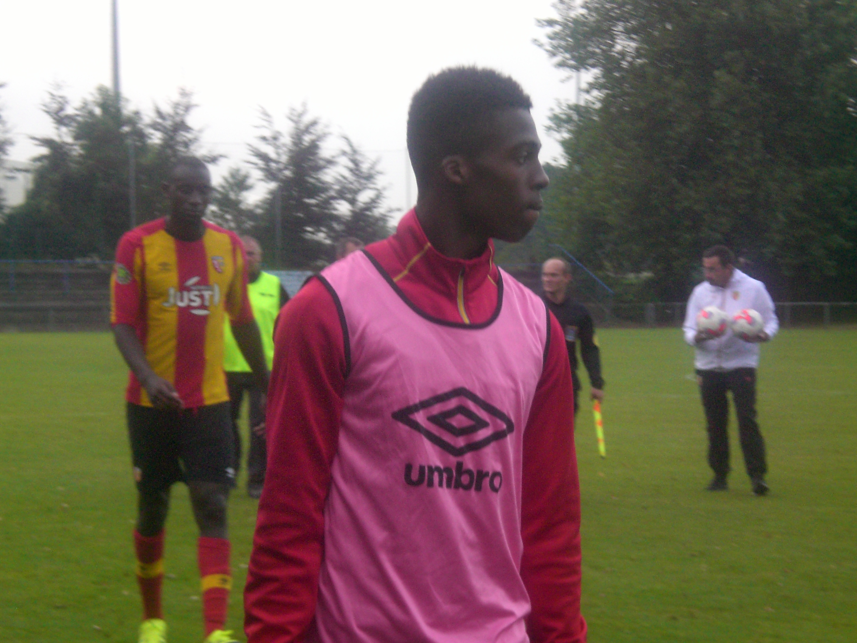 Jean-Kévin Duverne après la rencontre RC Lens B / FC Dieppe, comptant pour la 1ère journée du Championnat de France Amateur de football (CFA), le 15 août 2015, au Stade François-Blin d'Avion